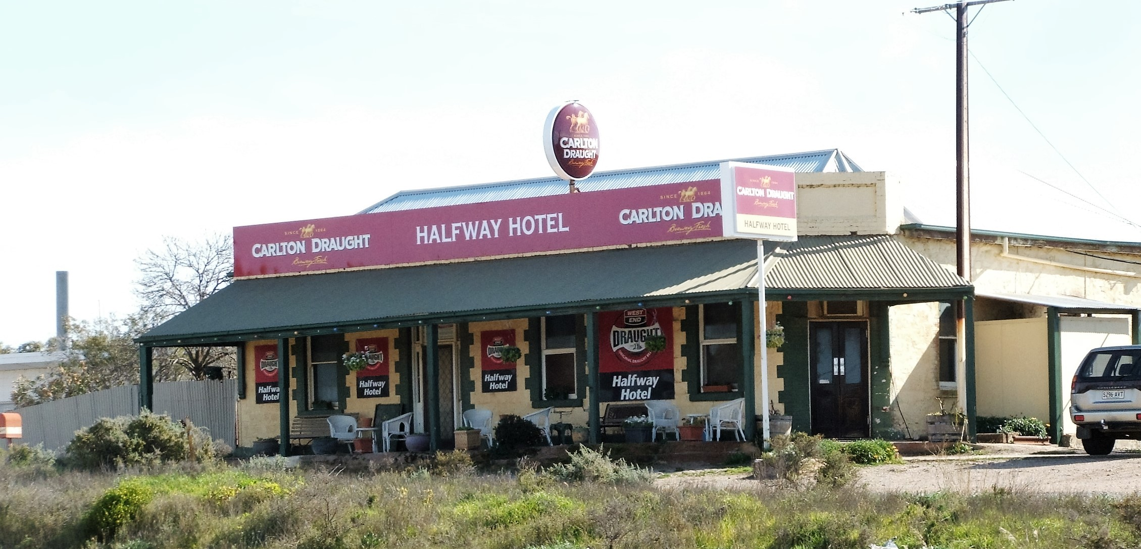 Oodla wirra 2015 (7)